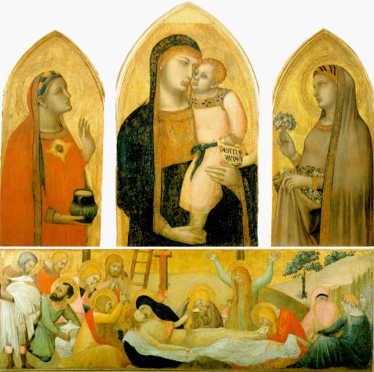 Lorenzetti_Ambrogio_madonna-and-child-.jpg